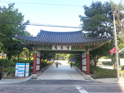 화도진공원. 인천 동구 화도진로 114